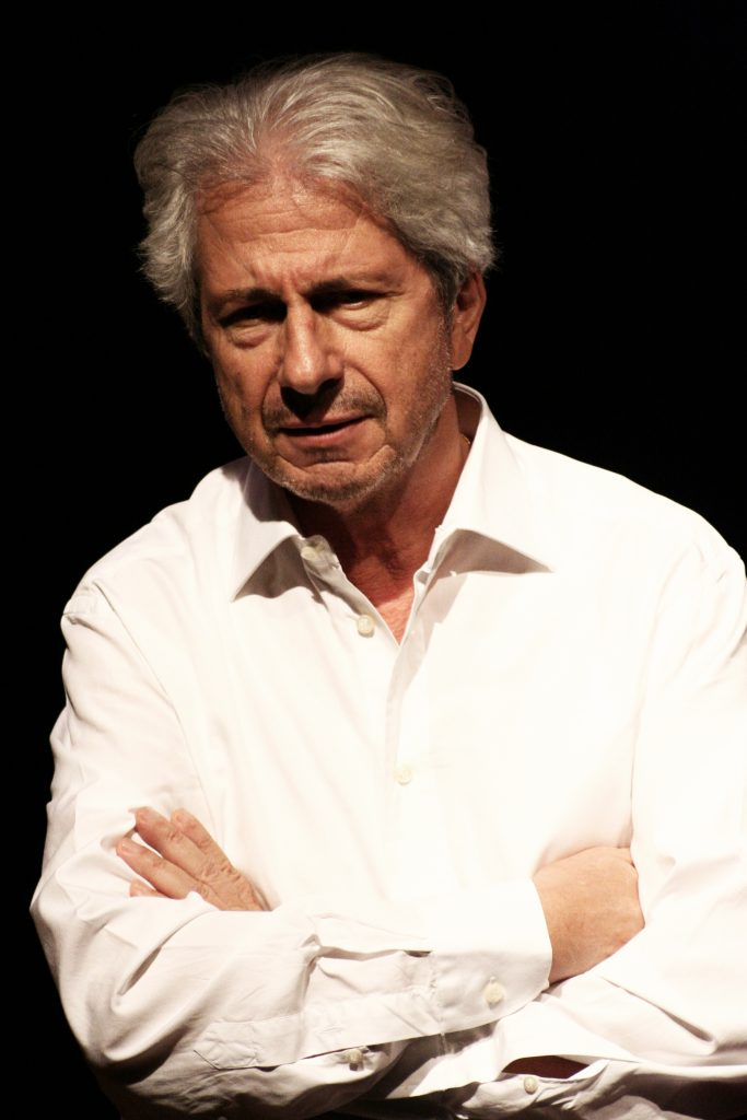 Momento di una scena teatrale dell'attore Mario Faticoni